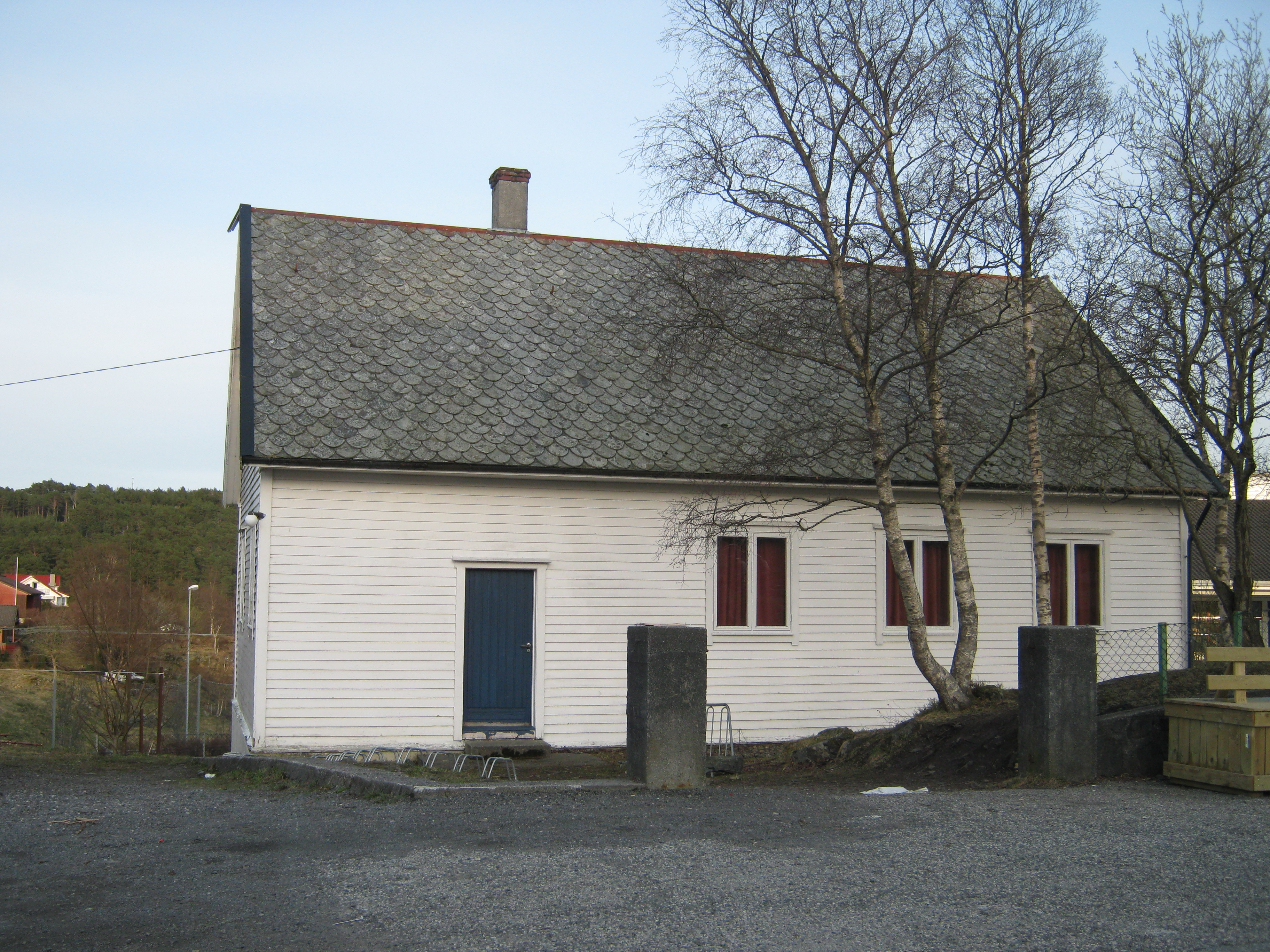 Den gamle skolebygningen (losjehuset) fra 1897 ved Haugland skole på Askøy.